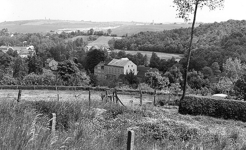 Original image description from the Deutsche FotothekTriebischtal-Miltitz. Blick ins Triebischtal mit Miltitzer Mühle